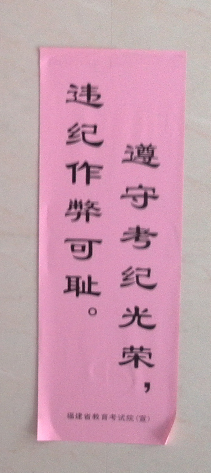 福州中考反作弊标语